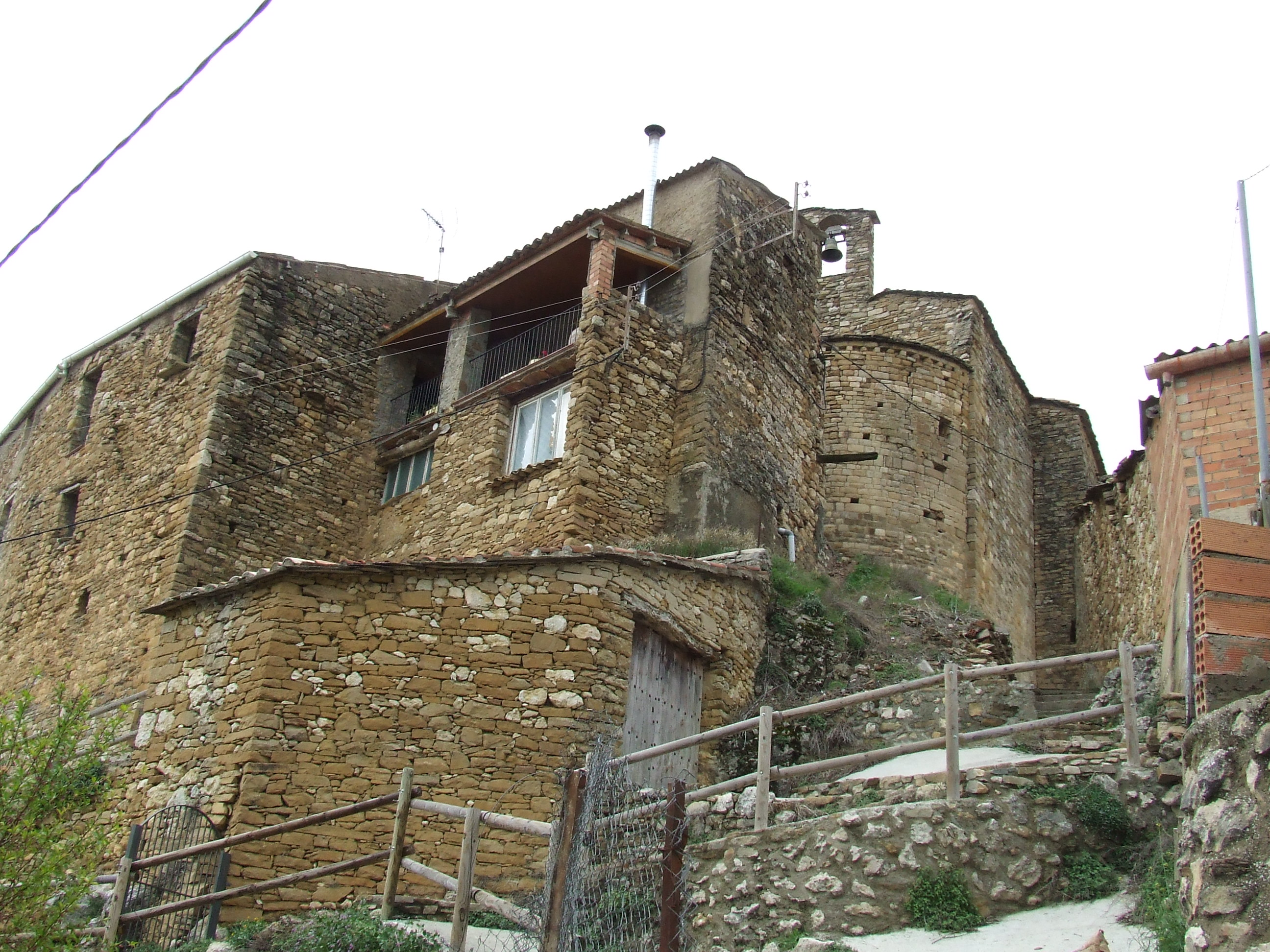 L'església, dalt del nucli alt de Moror (Sant Esteve de la Sarga, Pallars Jussà)